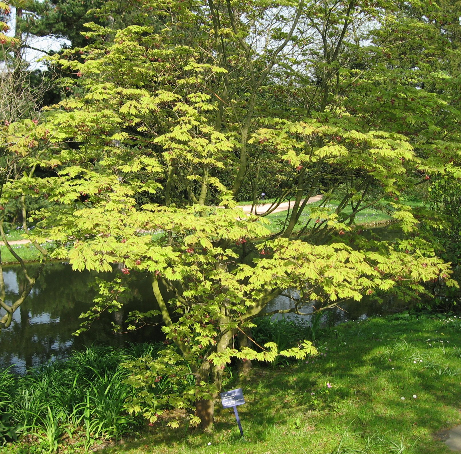 Acer japonicum 'Aconitifolium' Thunb. (Erable du Japon (cultivar)) in Arboretum de la Vallée-aux-Loups Map: 48° 46' 22" N 2° 16' 5" E